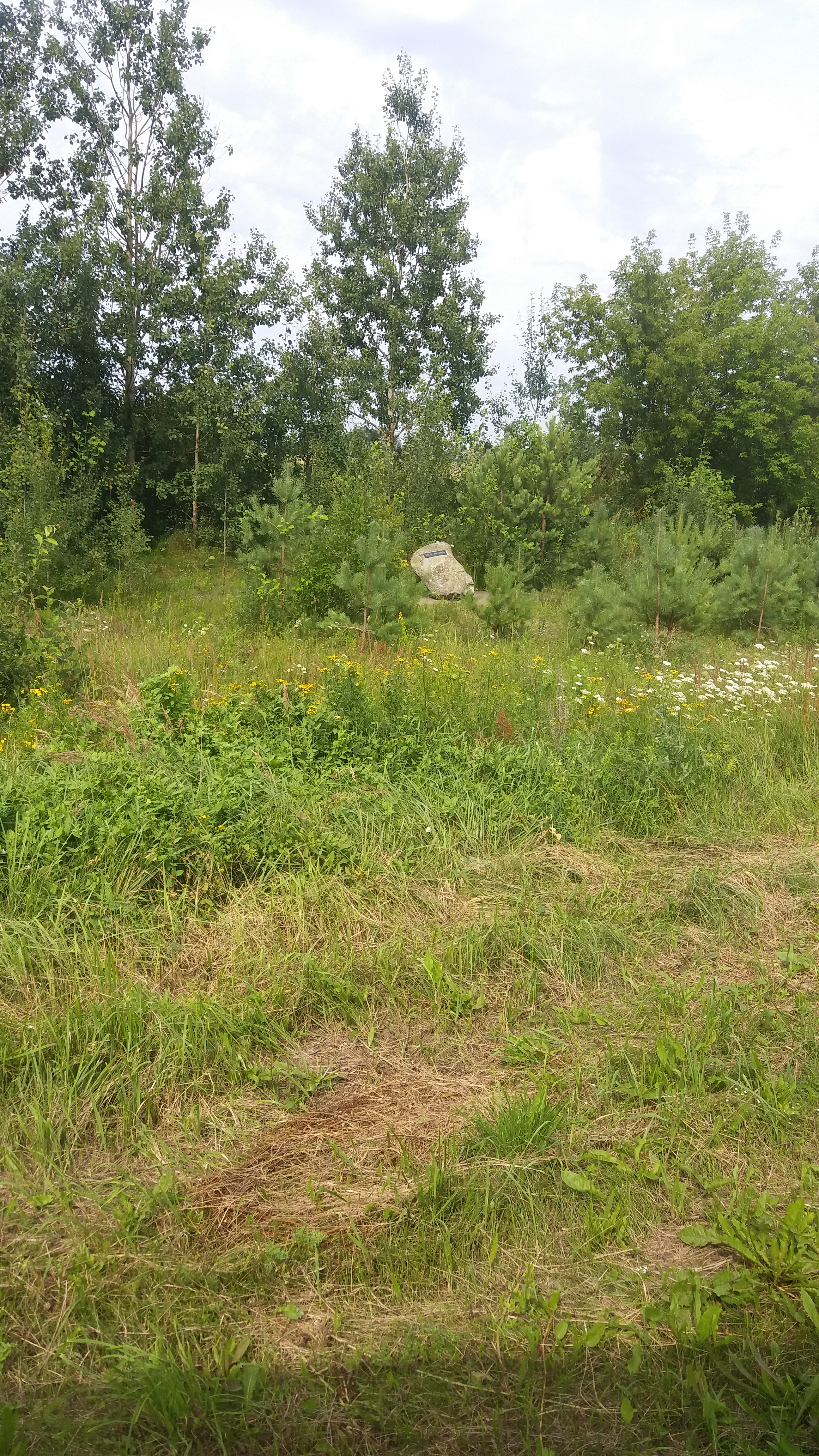 Памятный знак на одном из мест убийства нацистами евреев города Быхов Могилевской области Беларуси. Находится примерно в 200-х метрах от мемориала в урочище Гоньков ров, куда после войны были перезахоронены останки евреев, расстрелянных на этом месте.